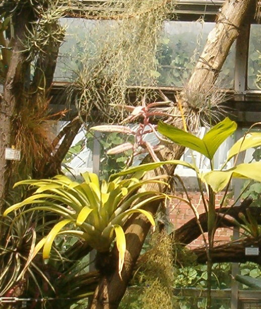 At Botanical Gardens Berlin-Dahlem Species Tillandsia reuteri